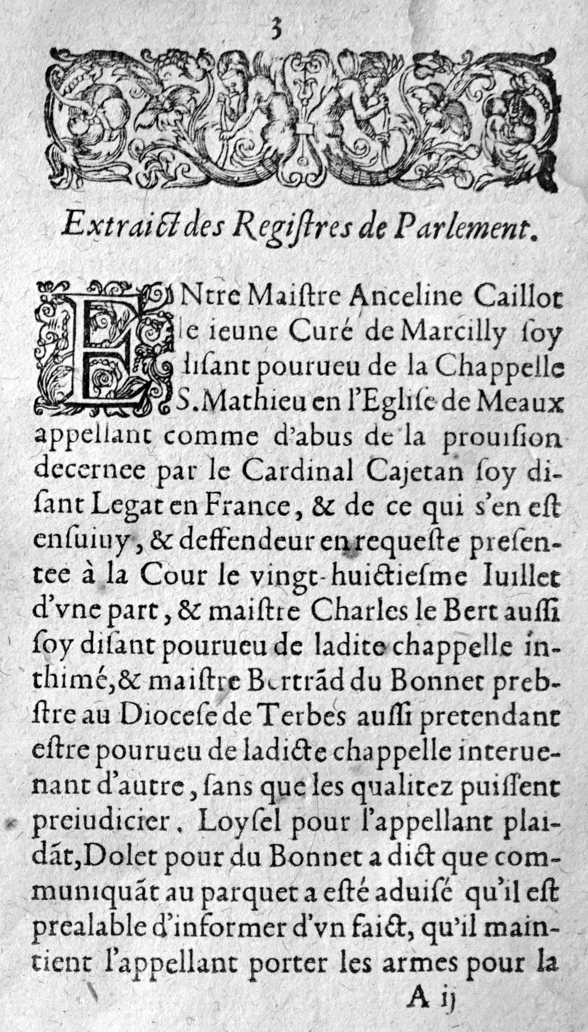 arrêt de la cour contre Caietan et Plaisance.